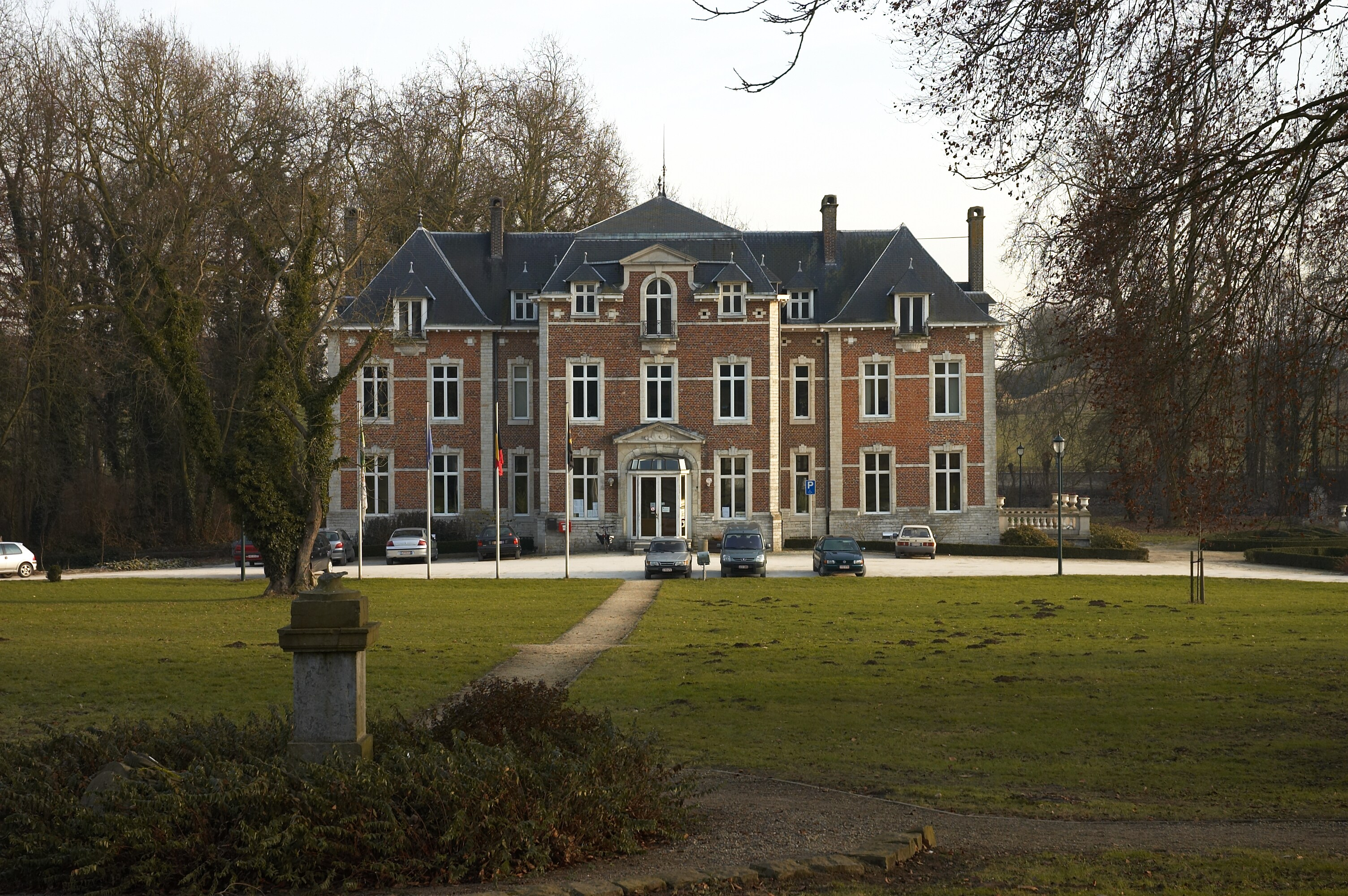 Domein van Kwabeek. Het gemeentehuis Neervelpsestraat 11, 3370 Boutersem, België. Kijkend richting zuid-oost.